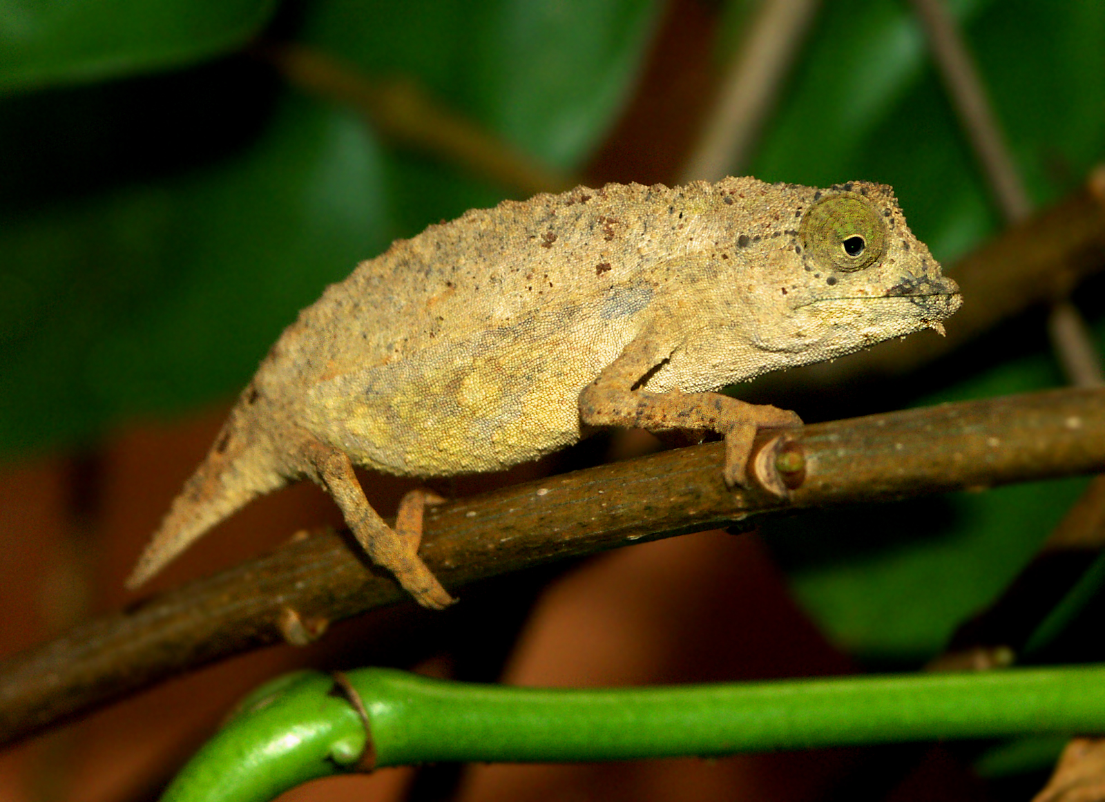 male Rieppeleon brevicaudatus